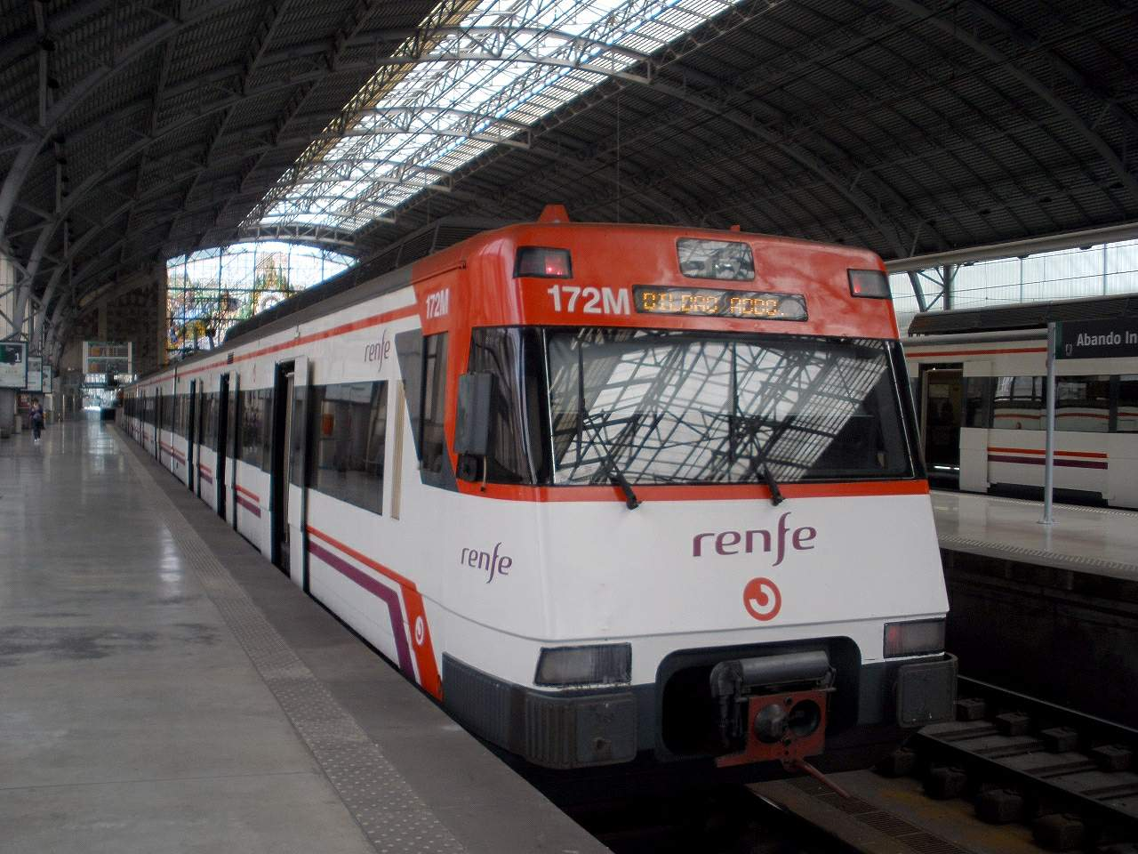 Estación de Abando Indalecio Prieto (Bilbao)